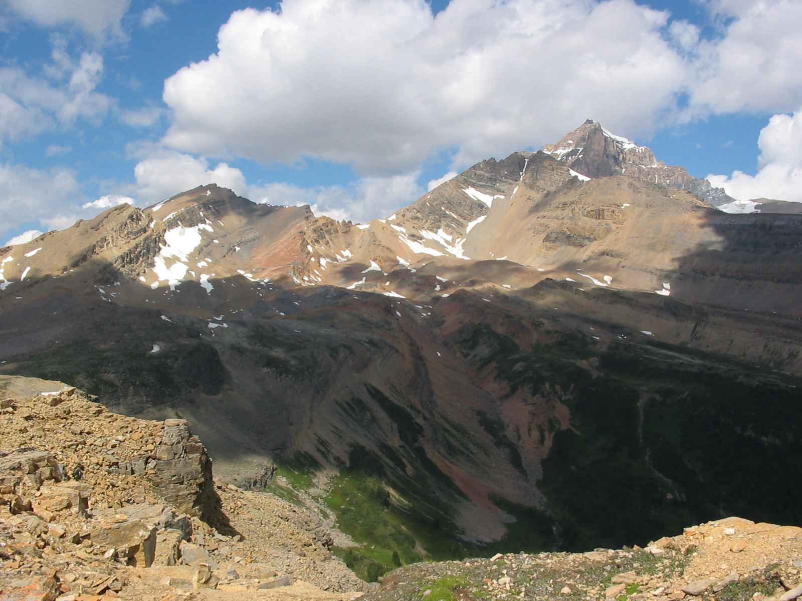 Fryatt Valley